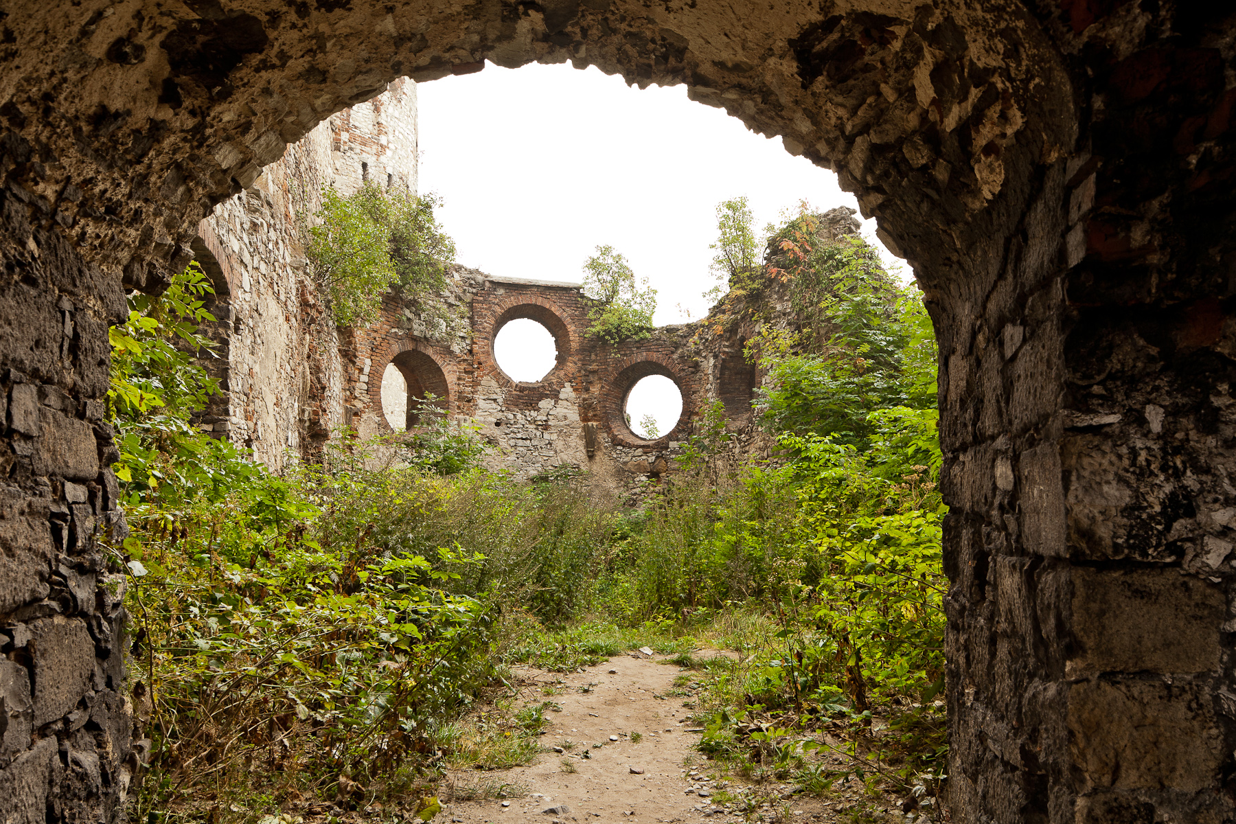 Ruiny zamku Tenczyn, Rudno